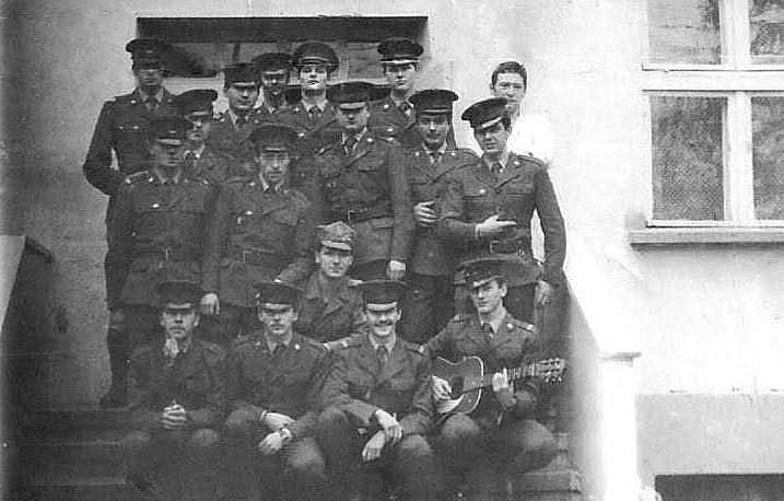 Strażnica Wojsk Ochrony Pogranicza Gorzyce - w drugim rzędzie, pierwszy z lewej szer. Wojciech Janiszewski, pozostali nn